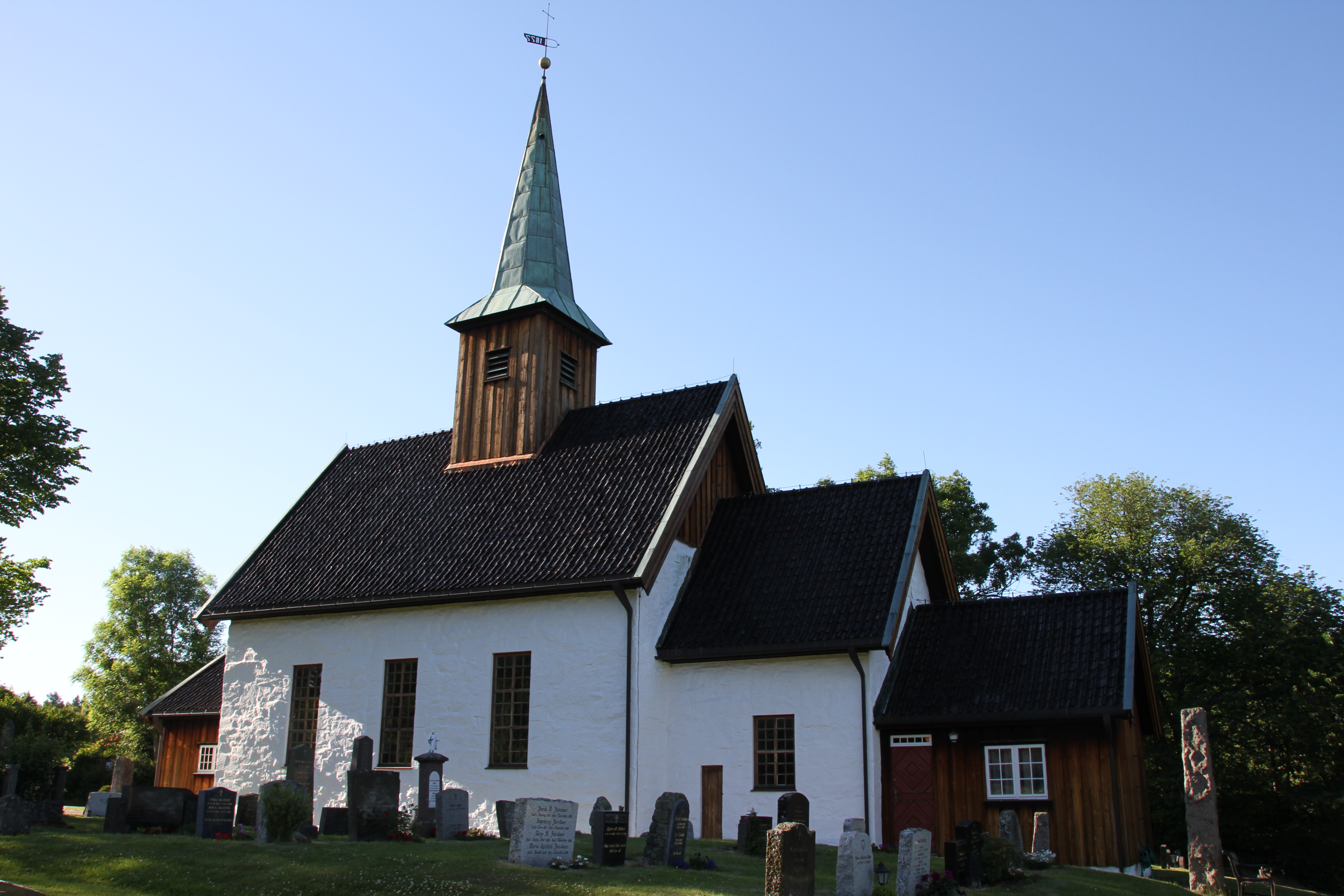 Nesodden kirke, sørøst for tettstedet Nesodden, Akershus.